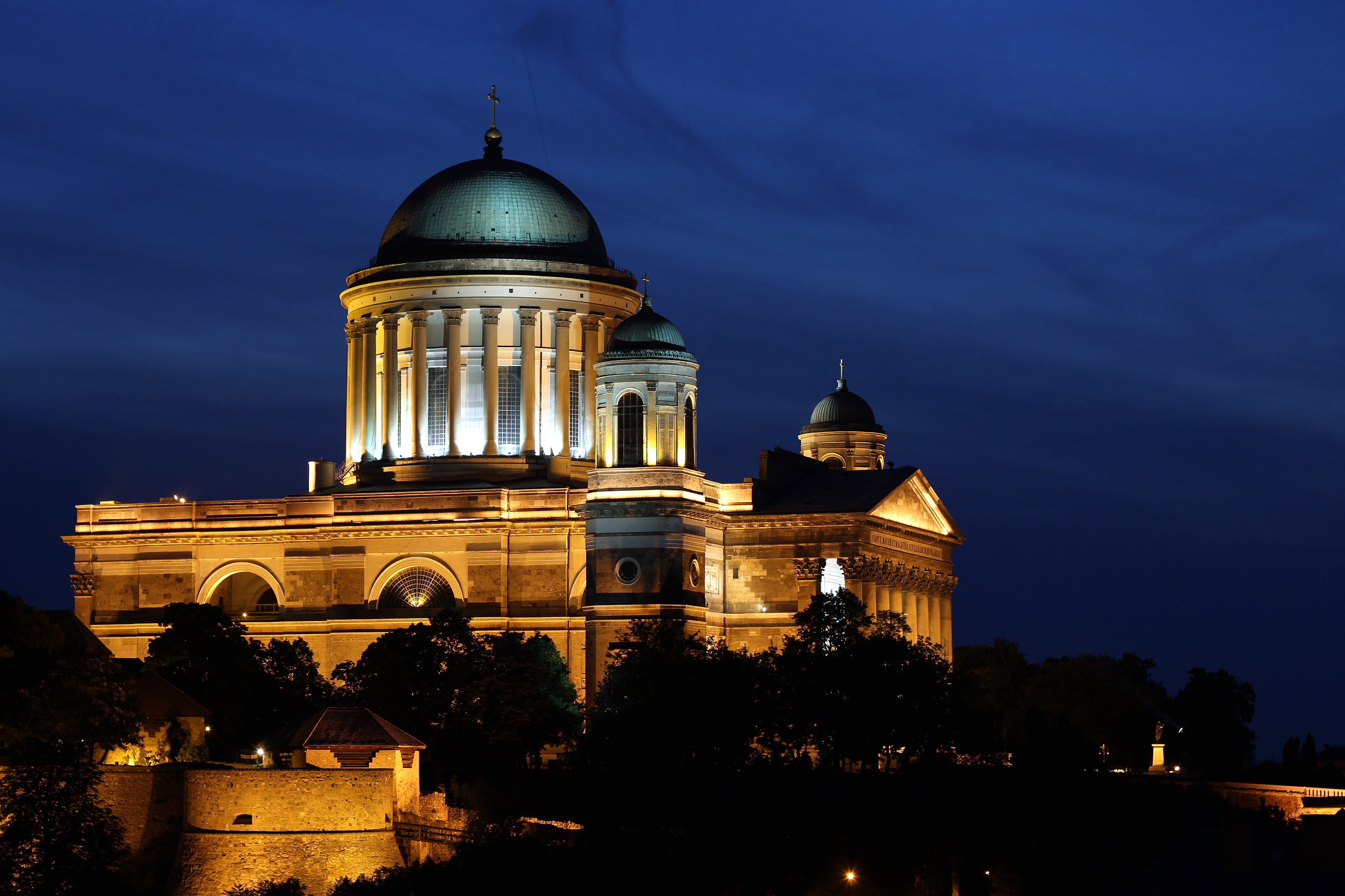 Esztergom Bazilika